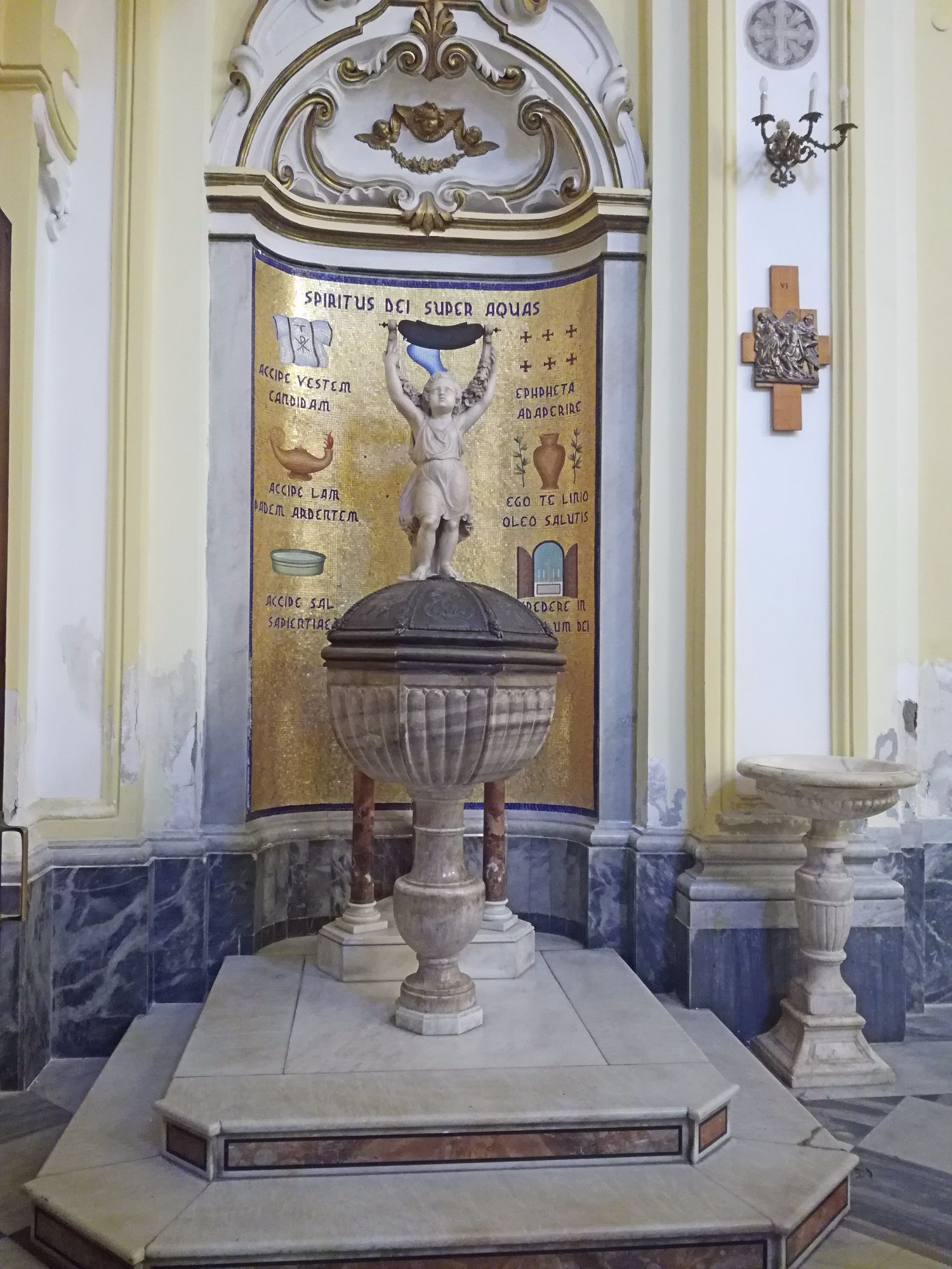 Interno, Maria dei Vergini, Napoli